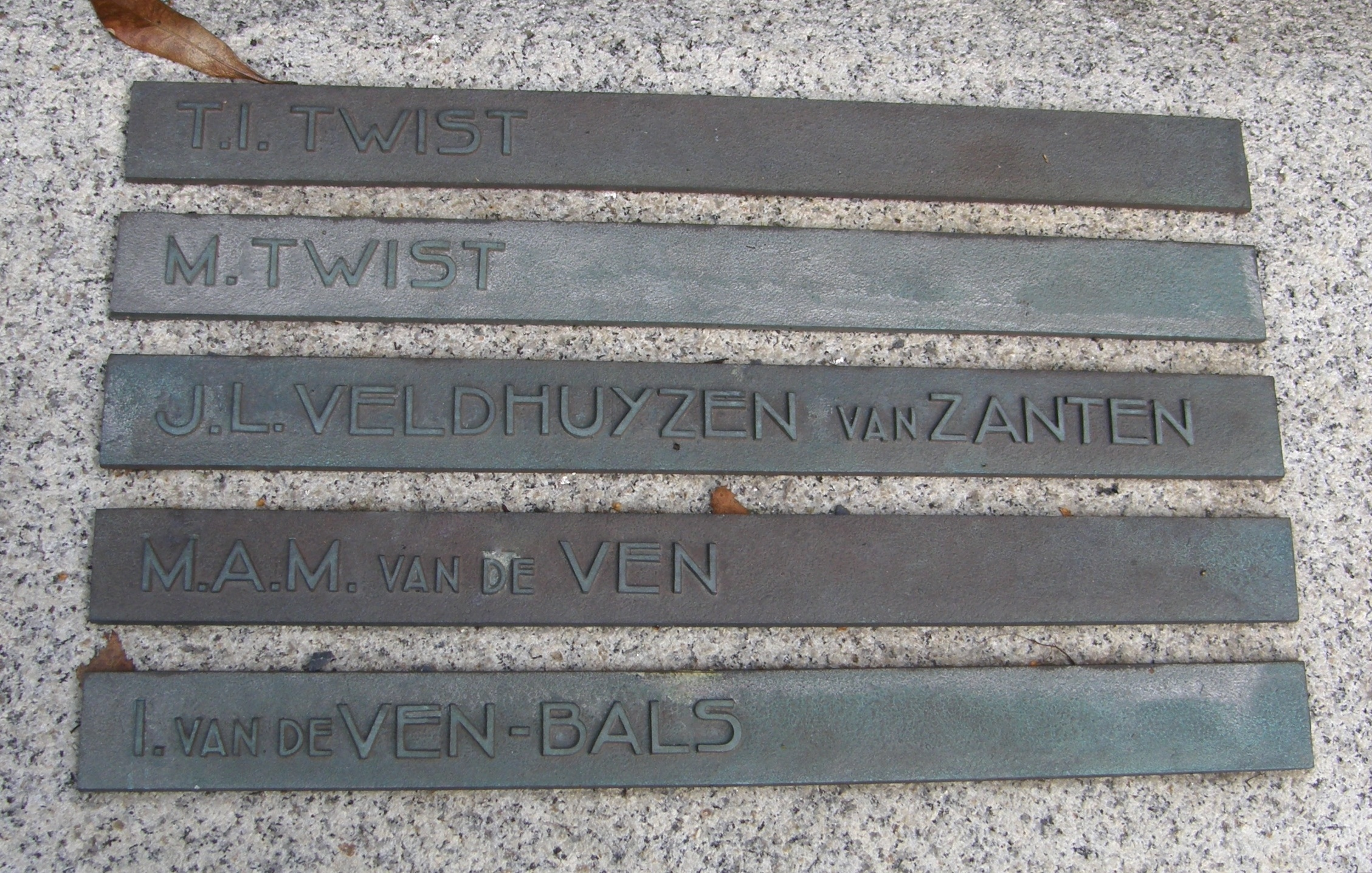 Надгробный камень с именем ван Зантена